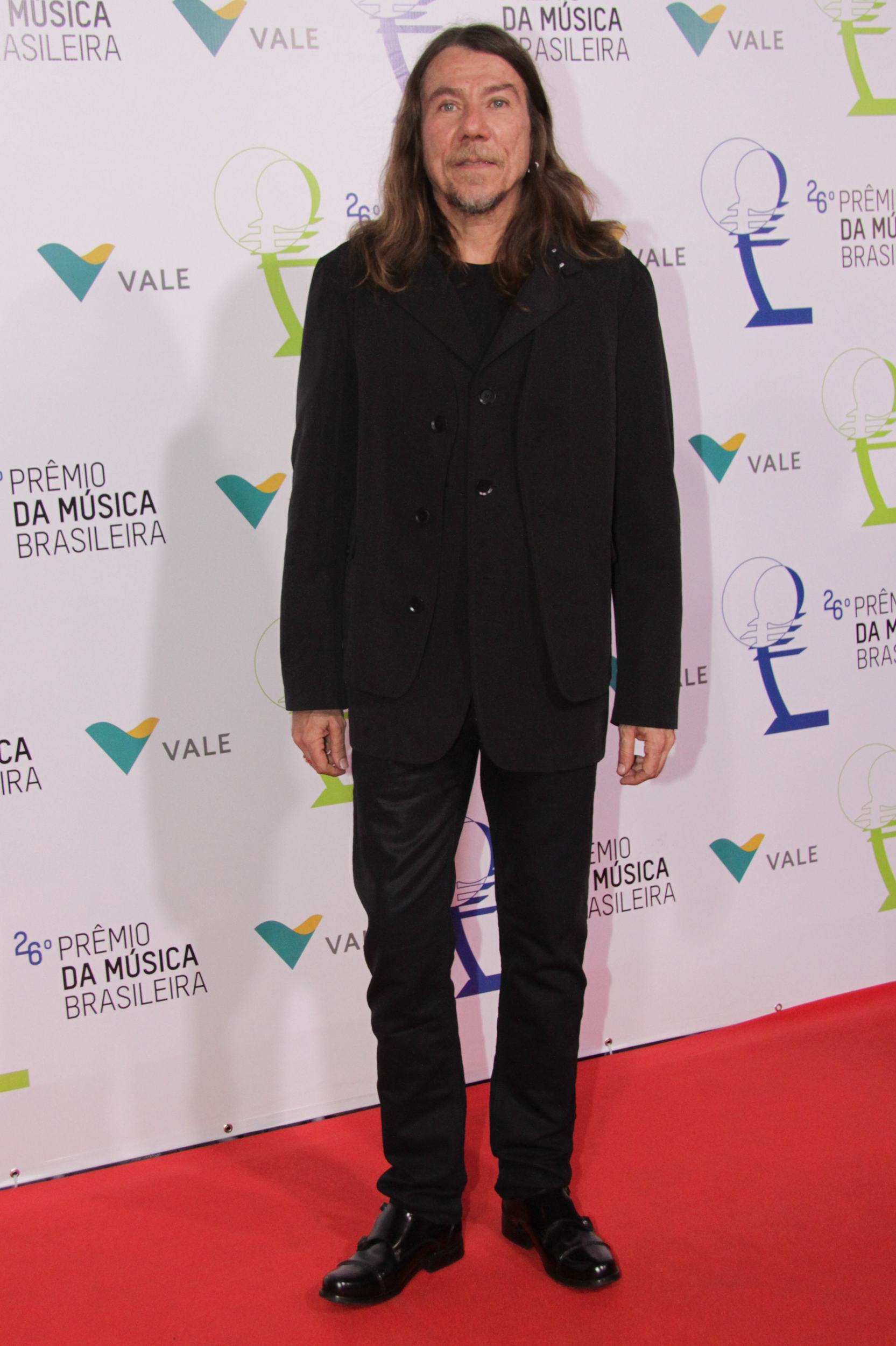 Lenine - 26° Prêmio da Música Brasileira 2015, no Theatro Municipal, no Centro do Rio de Janeiro/RJ. (10/06/15) Foto: Roberto Valverde/Divulgacão